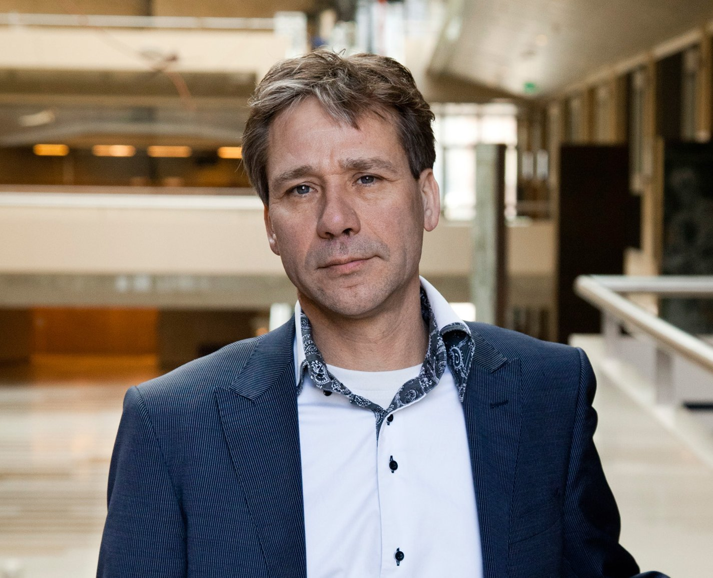 Hendrik Johannes (Rik) Grashoff (Krimpen aan den IJssel, 5 april 1961) is een Nederlands civiel ingenieur en Tweede Kamerlid voor GroenLinks.